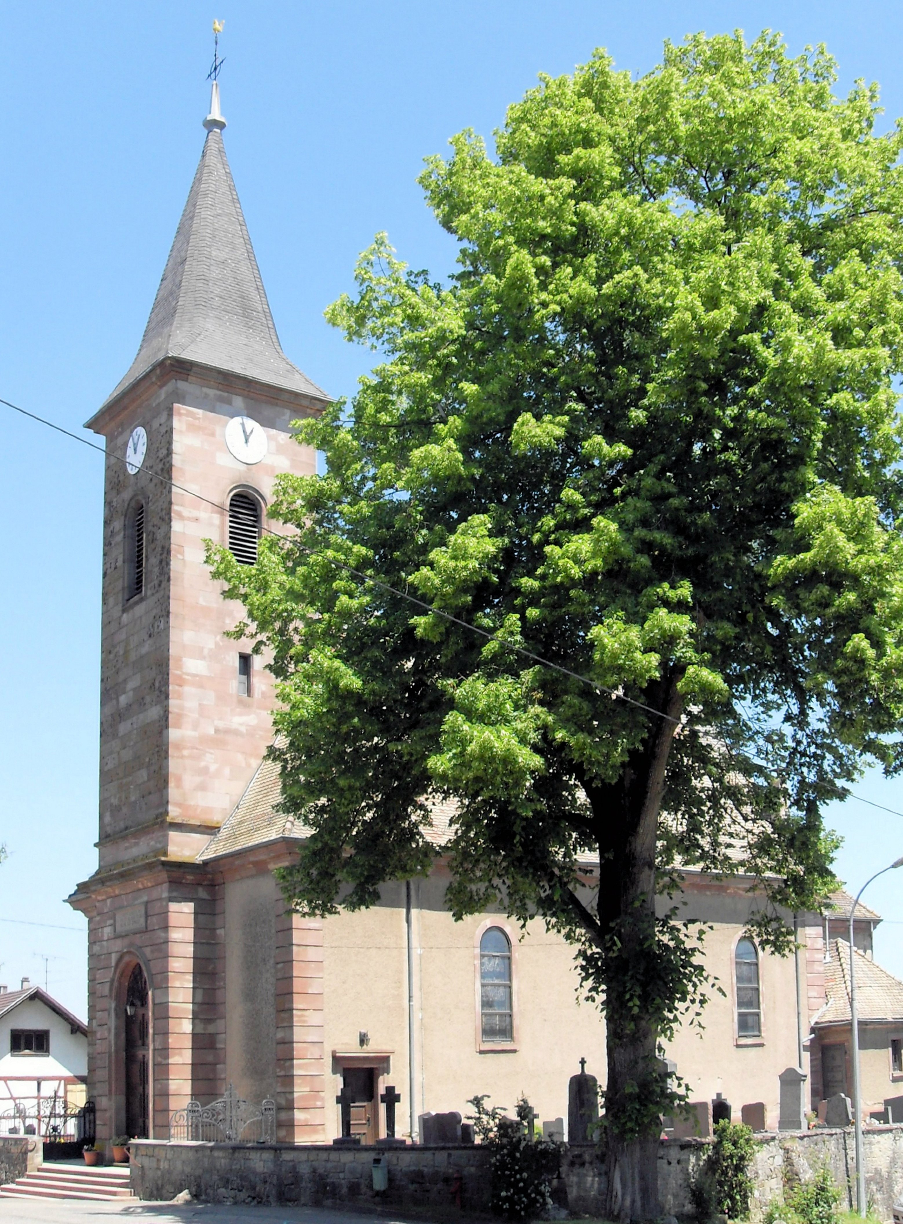 L'église Saint-Léger d'Eglingen